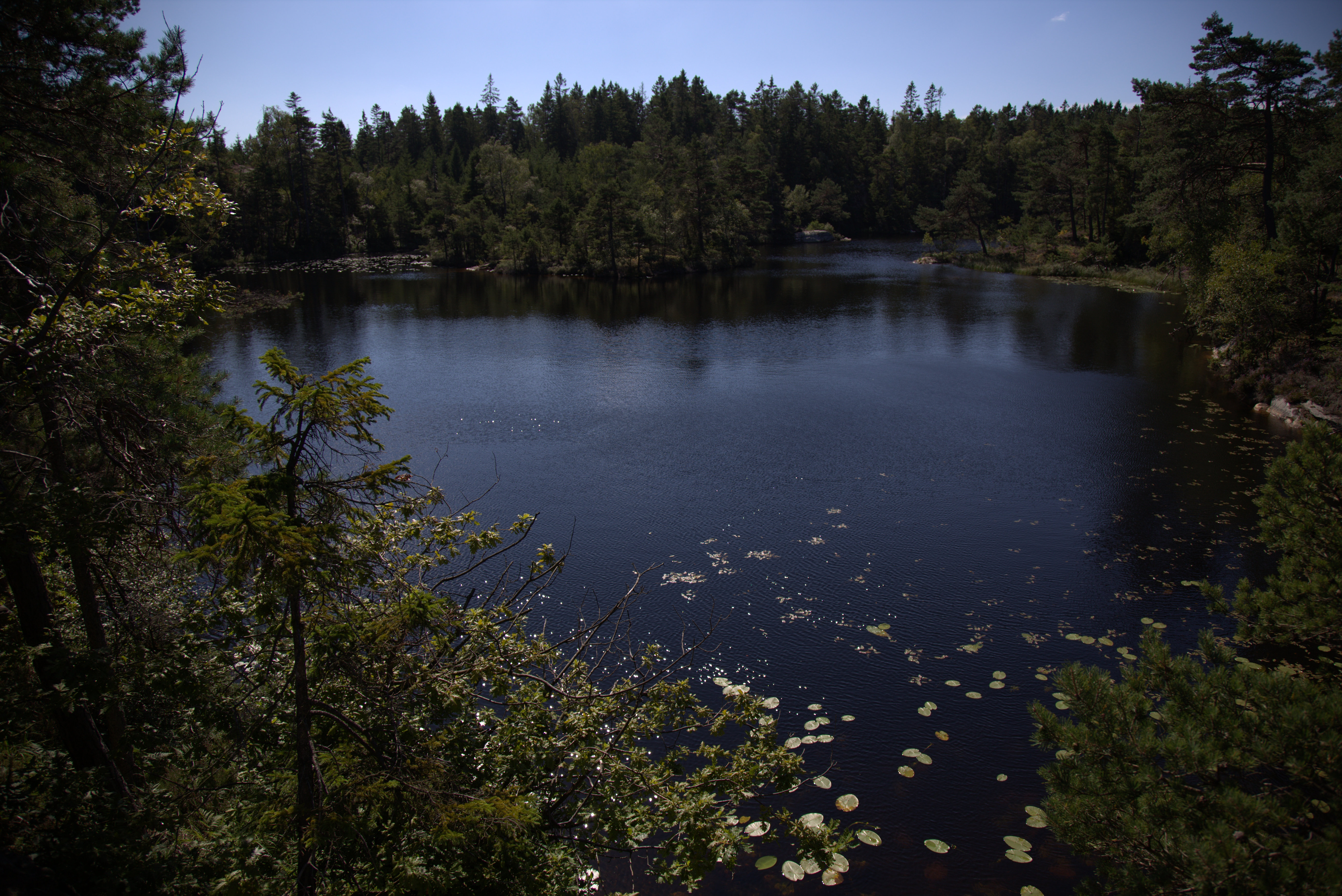 Lilla Holmevatten i Stenungsunds kommun.